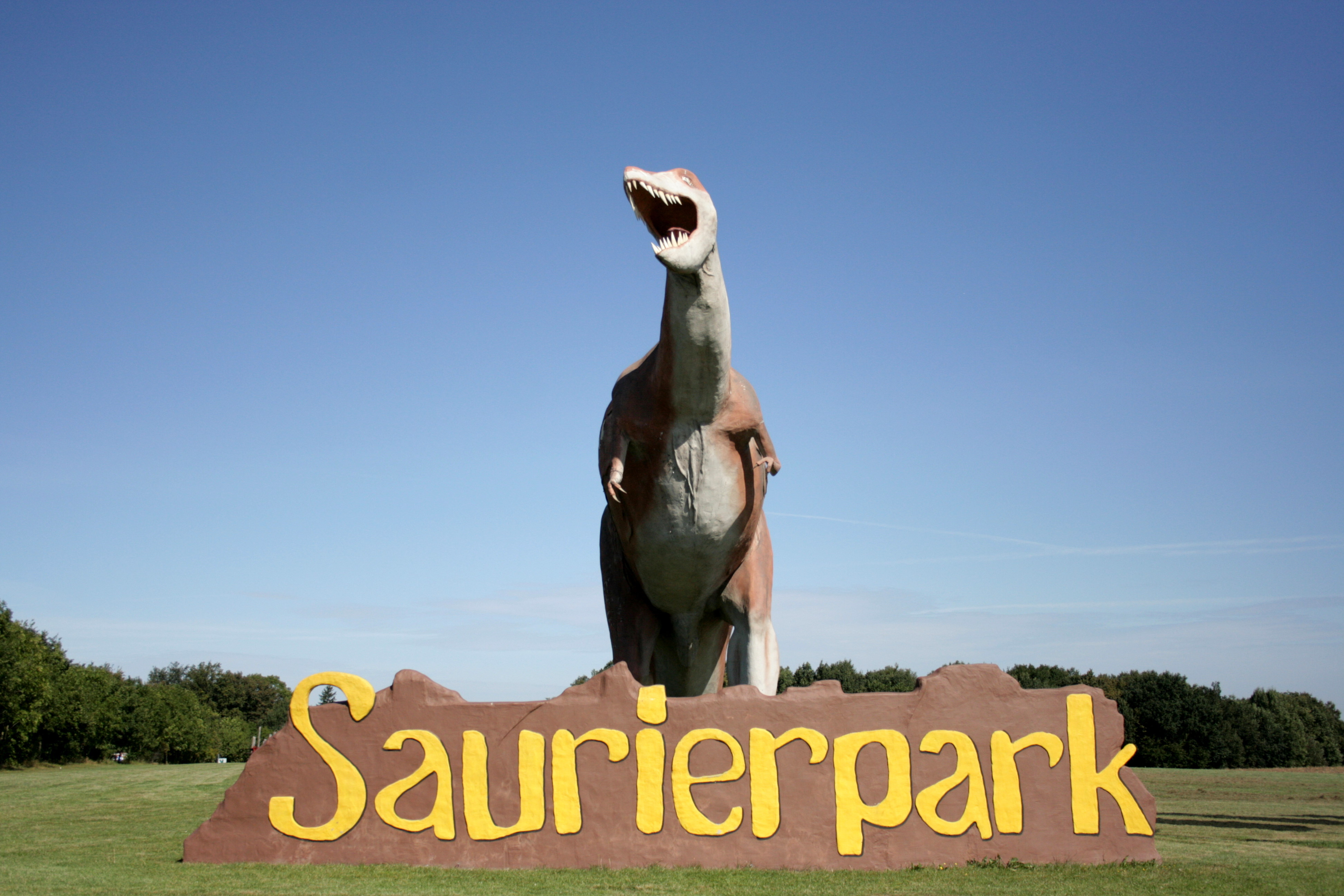 Saurierpark in Bautzen-Kleinwelka: "Begrüßungs-Saurier" außerhalb des Parks, sichtbar vom öffentlichen Verkehrsraum